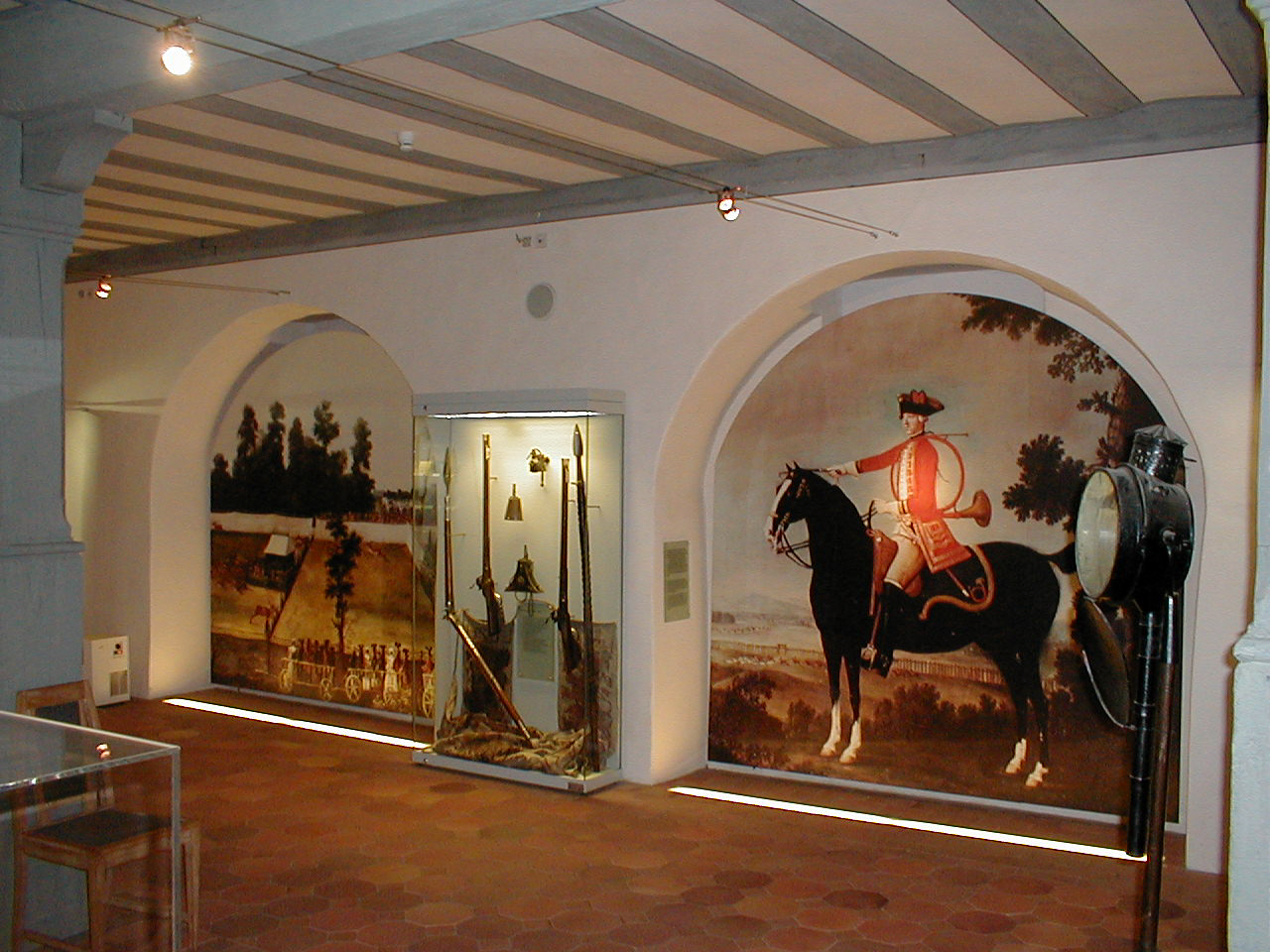 Jagdschloss Kranichstein: Schwerpunkt des Jagdmuseums ist das höfische Jagen der Barockzeit